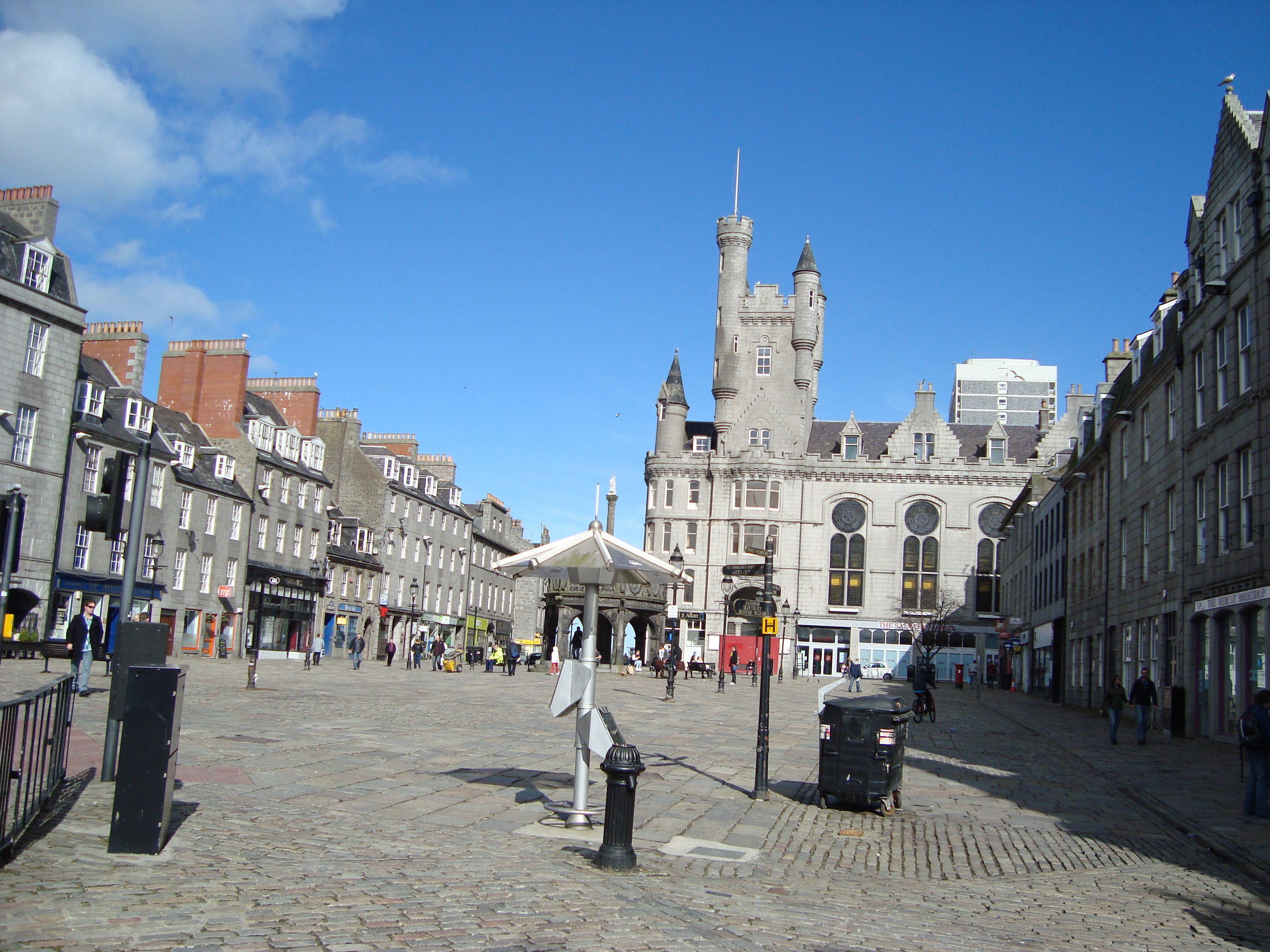 Aberdeen